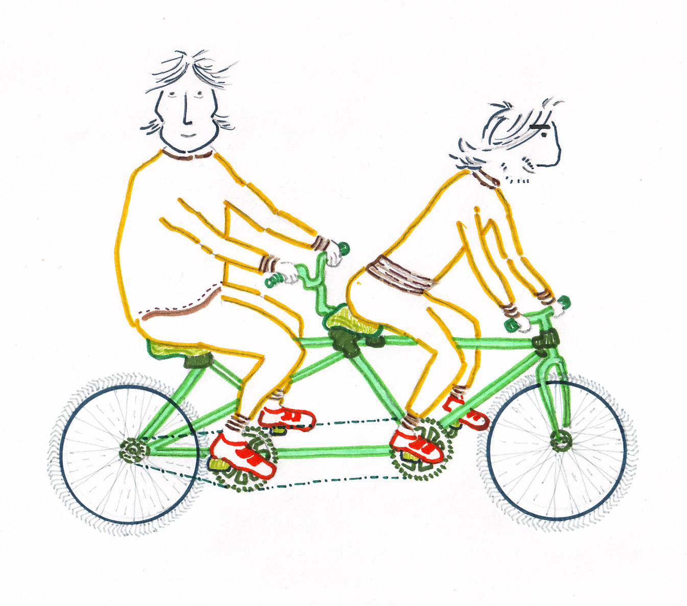 Caricatura de los radiofonistas, músicos y escritores españoles Fernando Luna y Carlos Faraco (autor de la obra). Tándem creativo entre 1975 y 2014. (Faraco, más menudo, va delante para facilitar la aerodinámica en las pruebas contra el crono).